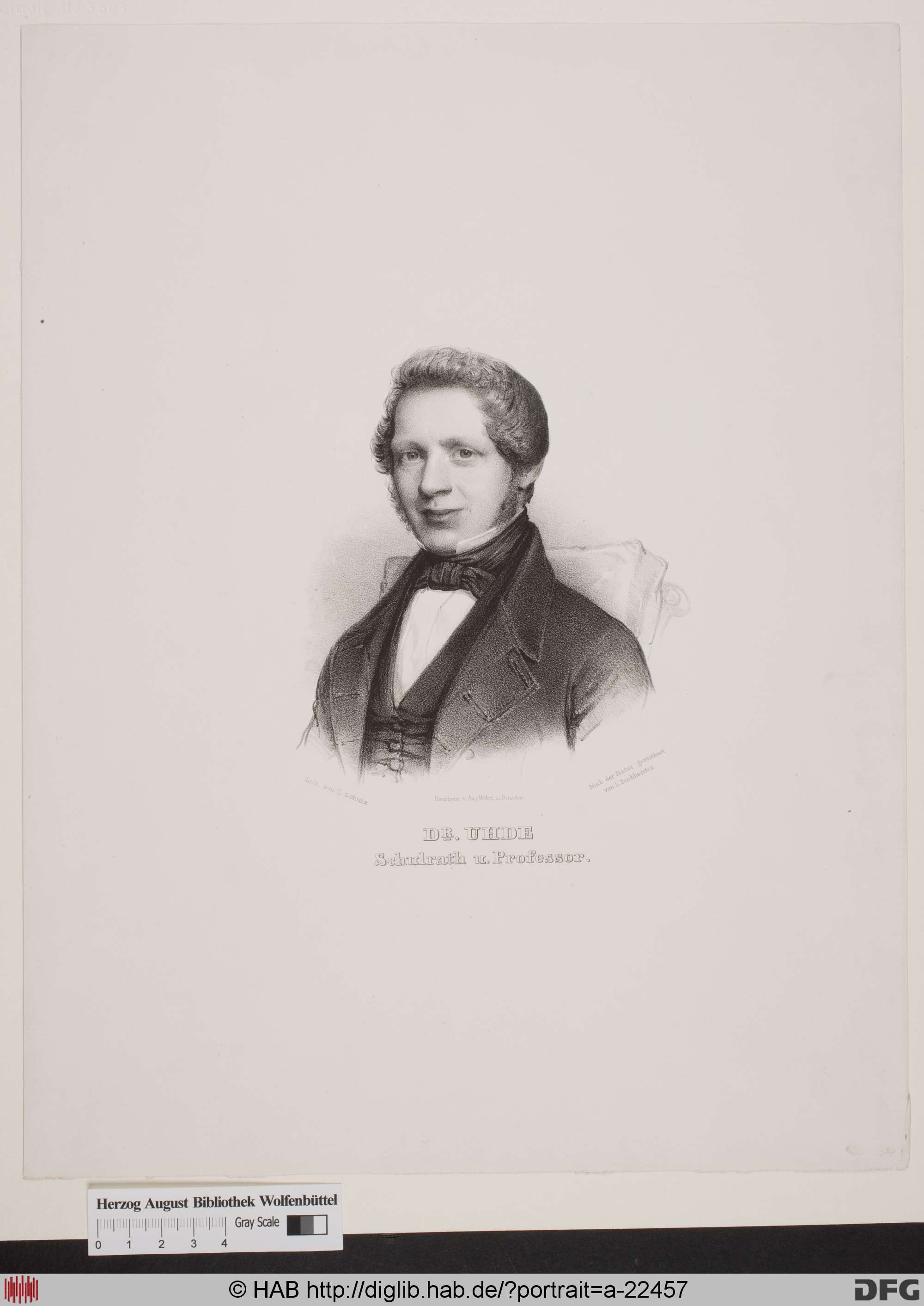 Porträt des Astronomen August Uhde (1807-1861)